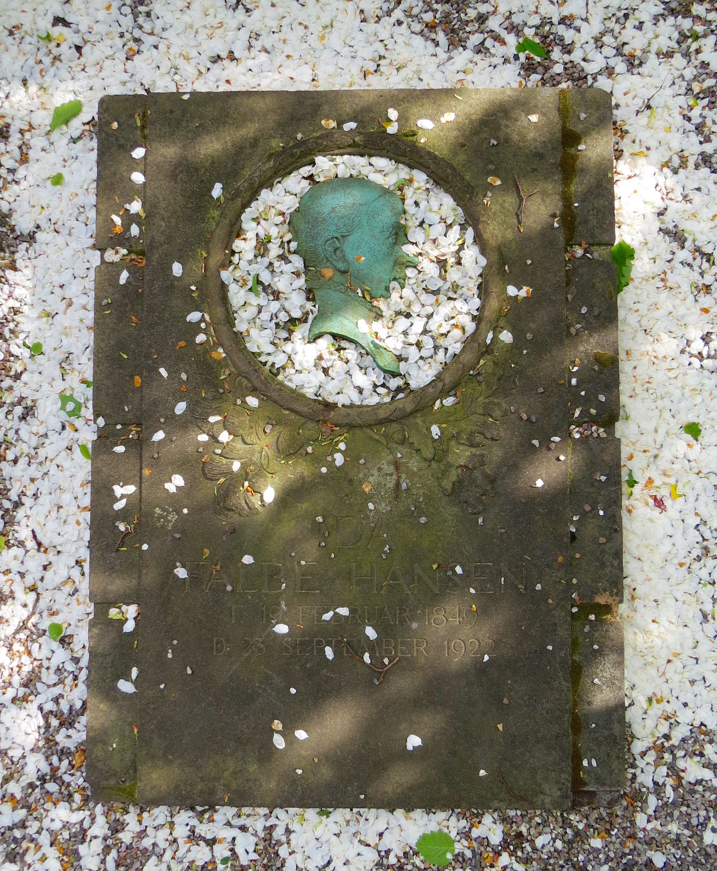 Gravminde for Ida Falbe Hansen, Frederiksberg Ældre Kirkegård